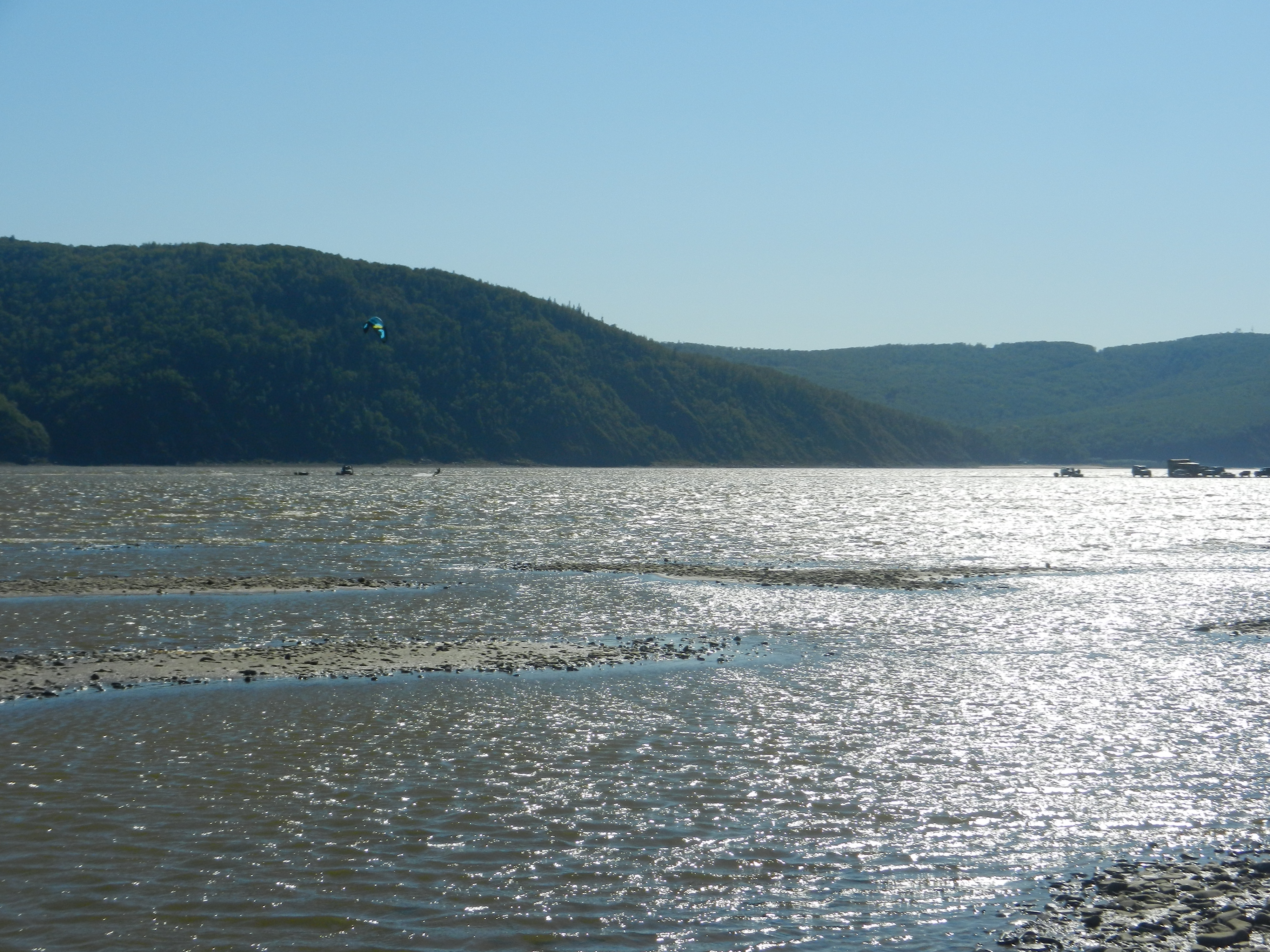 Амур в черте Комсомольска-на-Амуре